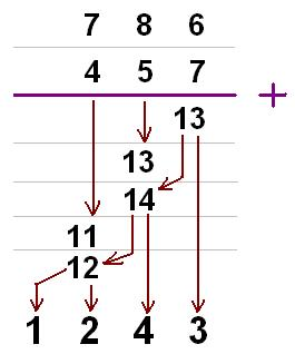 Voorbeeld van een optelling van 2 natuurlijke getallen